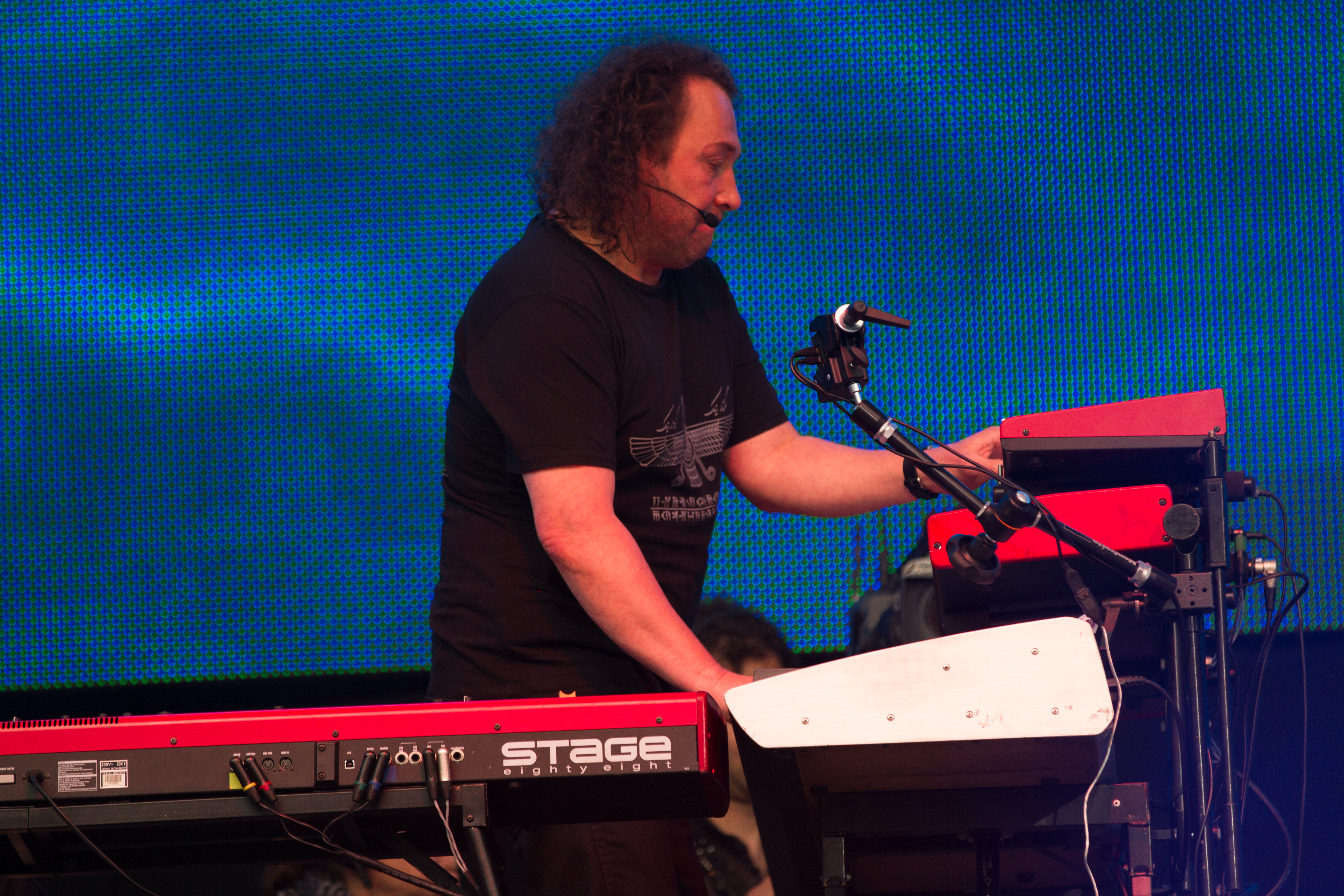 Martin Becker von Karat beim "Karat 40 Jahre KARAT - Das EINZIGE Jubiläumskonzert" in der Berliner Waldbühne am 20.06.2015